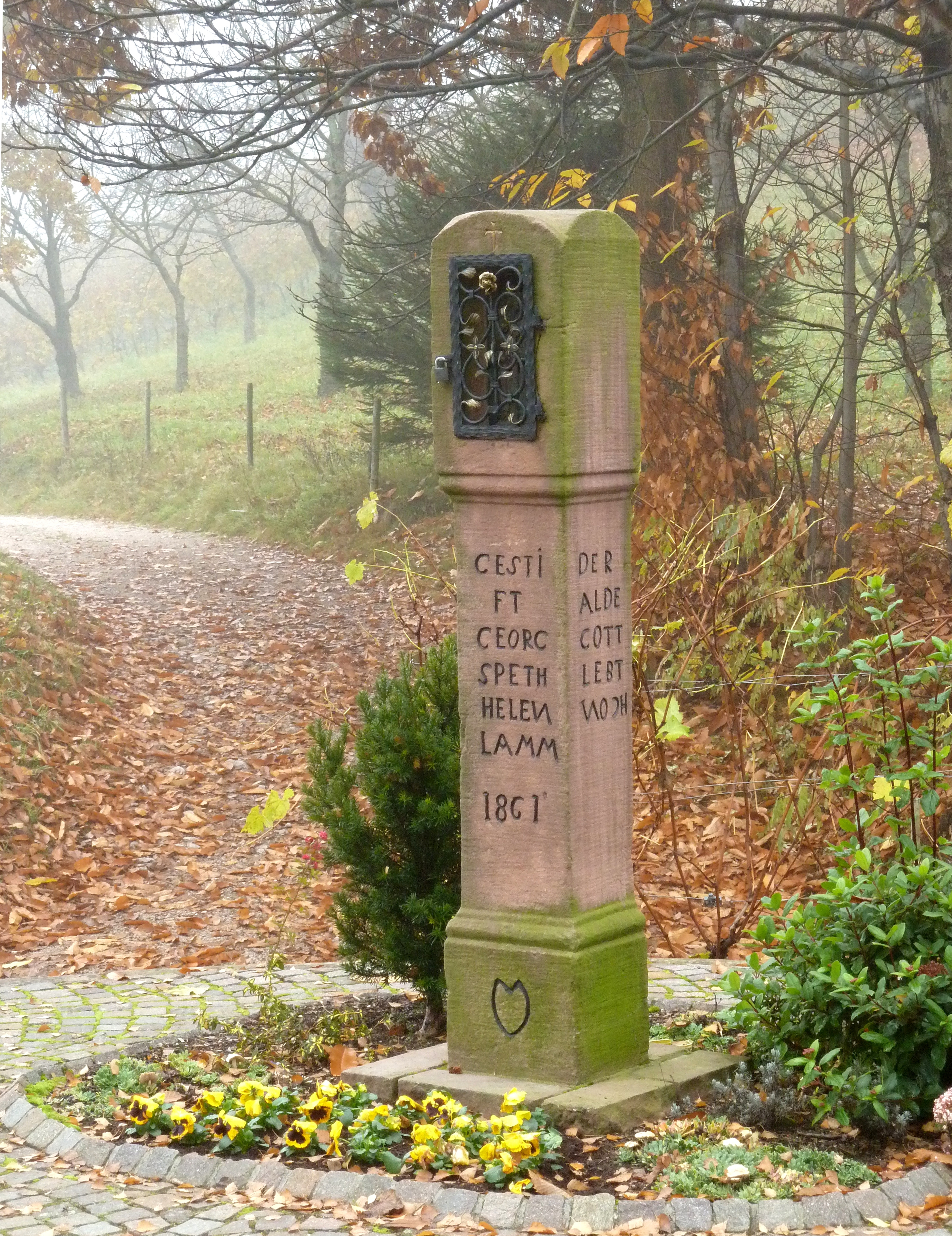 Alde Gott Bildstock in der Gemeinde Sasbachwalden